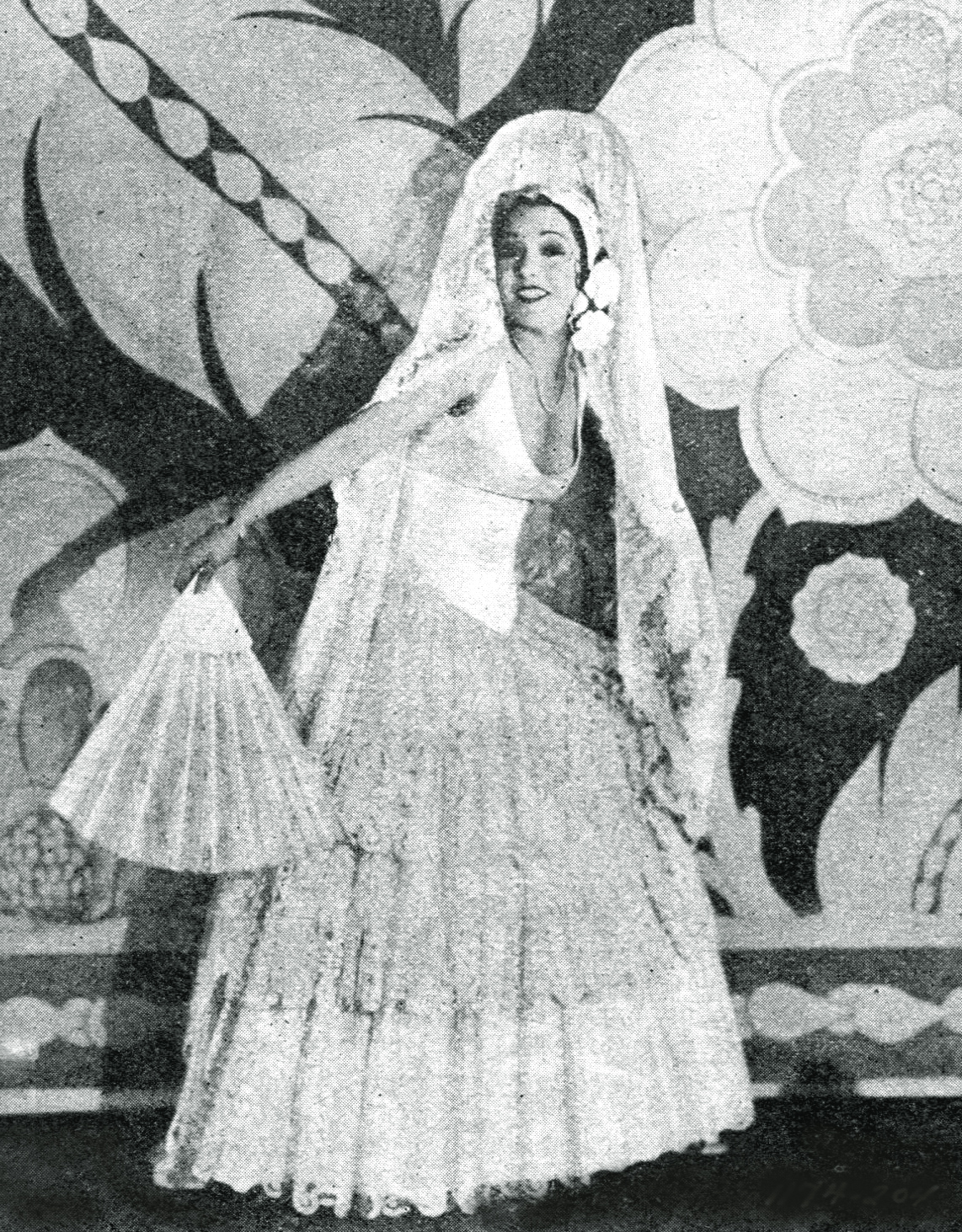 Lupe Velez in Canzone dei lupi (Wolf song) - dir Victor Fleming - 1929